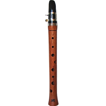 El clariphone es un instrumento de viento de caña simple, inventado y fabricado por Sans Luthier. Es una evolución del Chalumeau sin llaves, en el que se modifica la digitación, aumentando la gama del instrumento a más de dos octavas y media, del Si-1 al Sol 2.